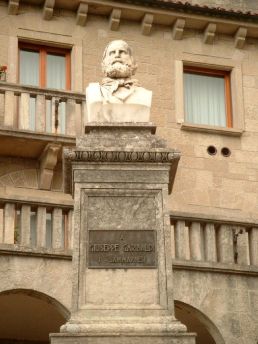 Busto di Giuseppe Garibaldi a San Marino, primo monumento in assoluto al mondo dedicato all'Eroe dei due mondi. Opera di Stefano Galletti, è stato eretto nel 1882.